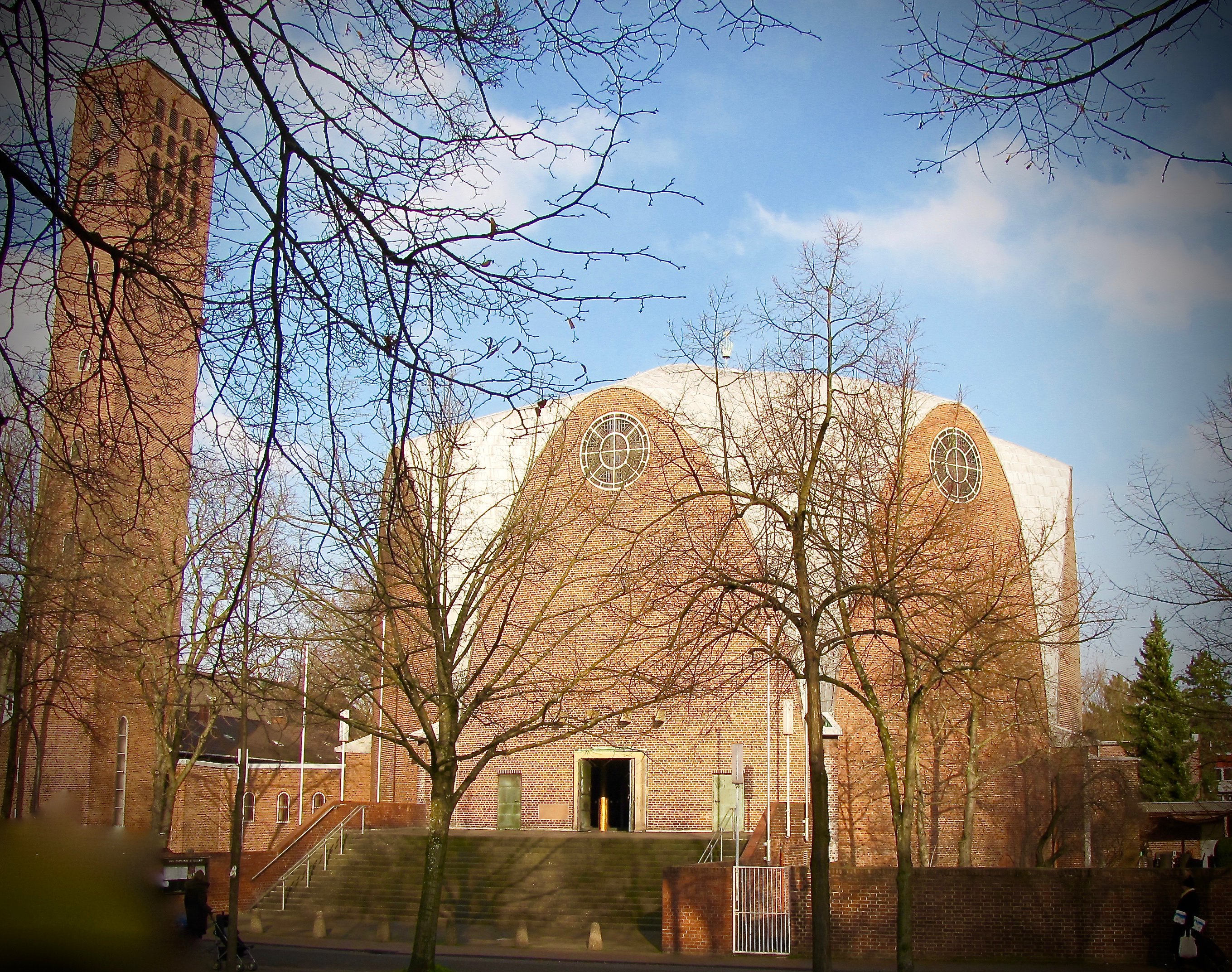 St. Engelbert (Köln-Riehl): Der Zentralbau steht auf einem Sockel mit vorgelagertem Treppenaufgang. Campanile freistehend. Architekt: Dominikus Böhm 1930-1932